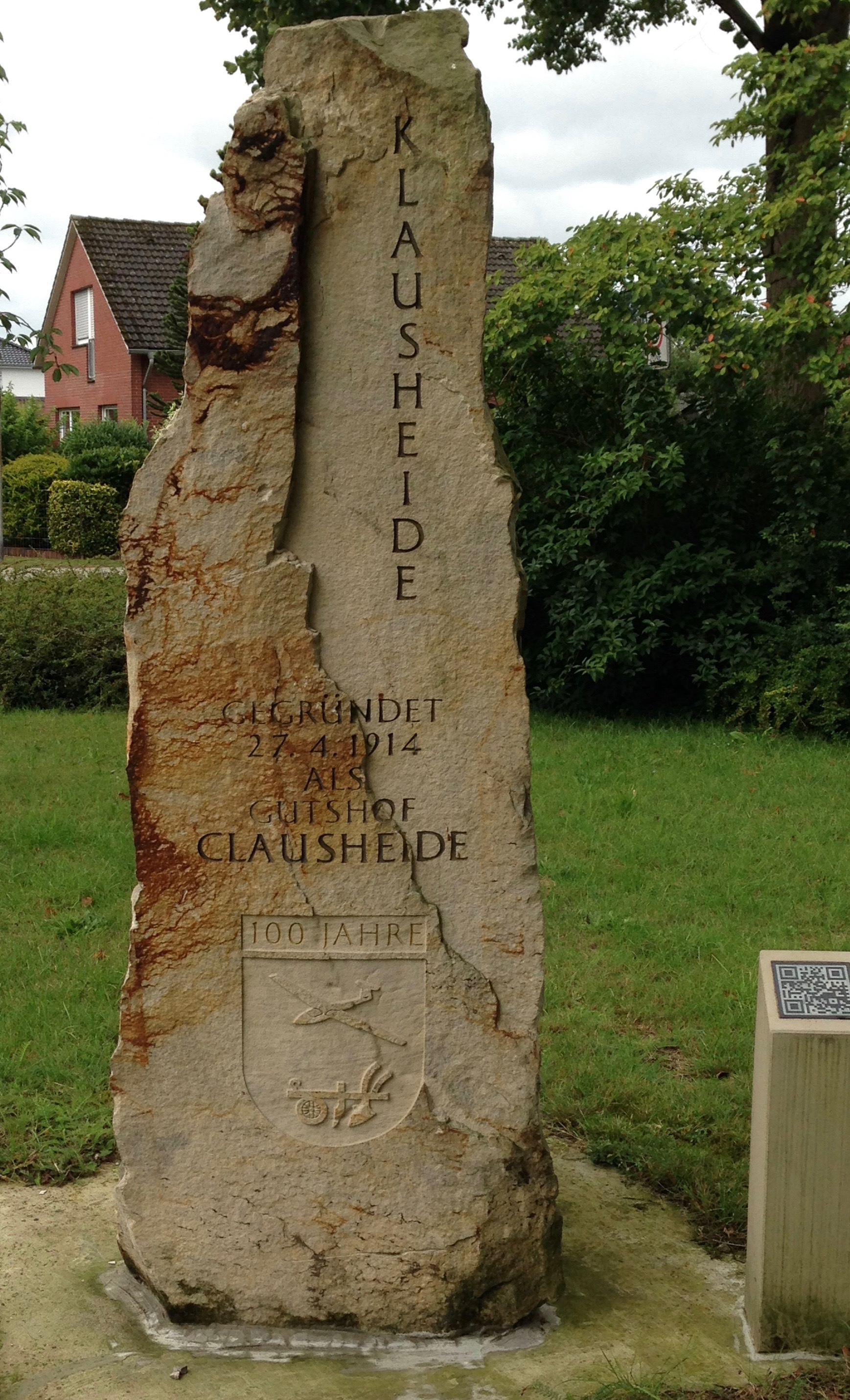 Gedenkstein zum 100. Gründungstag von Gut Klausheide 2014 (Grafschaft Bentheim, Niedersachsen); Vollansicht